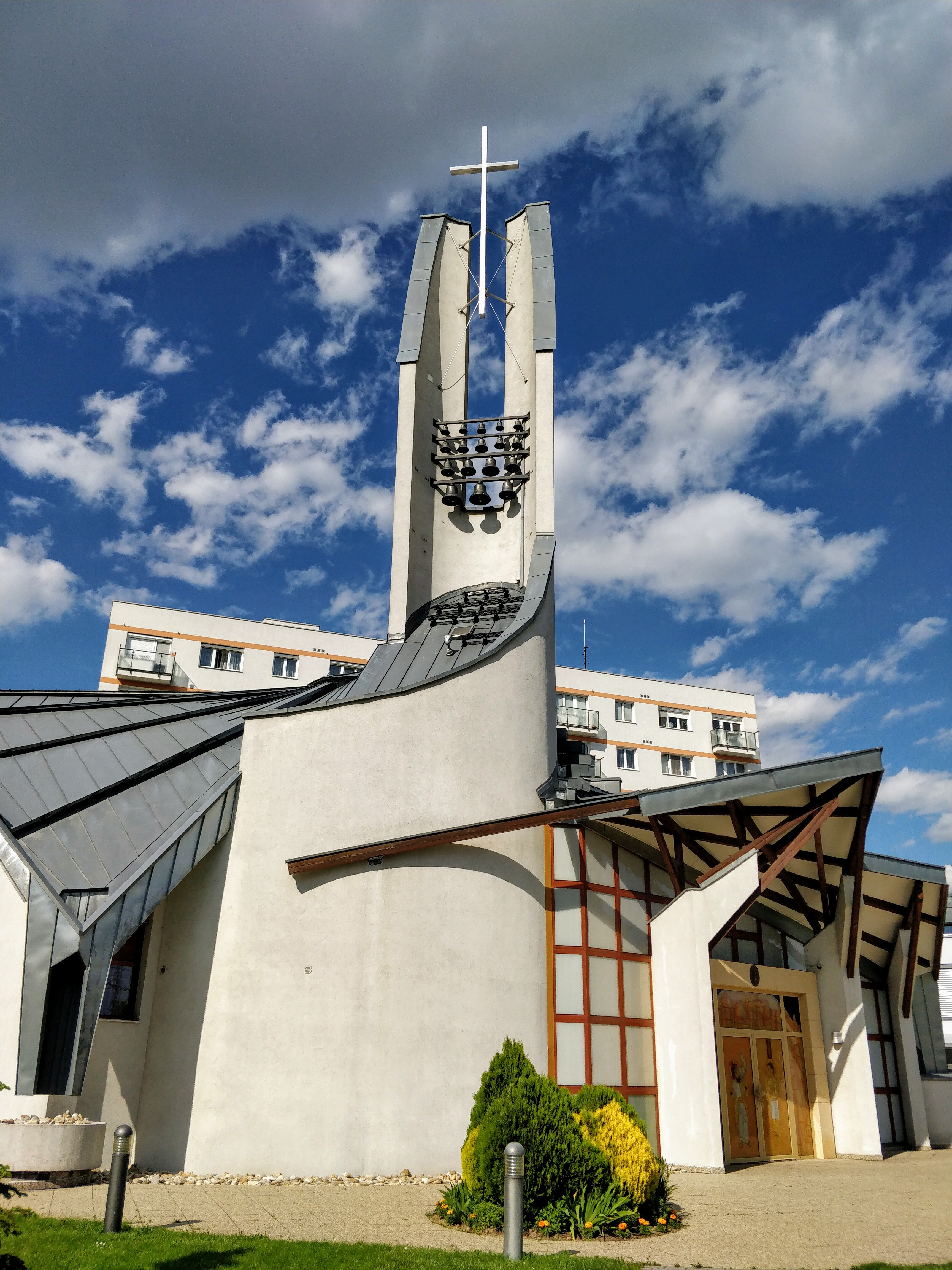 Katedrála svätého Šebastiána